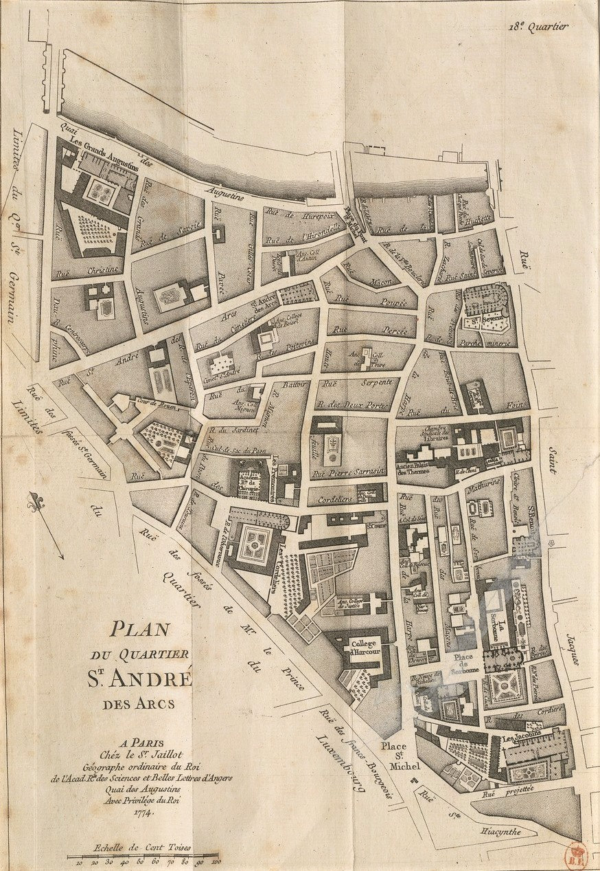 Plan du quartier Saint-André-des-Arcs par Jaillot (1772) dans Recherches critiques, historiques et topographiques sur la ville de Paris, depuis ses commencens connus jusqu'à présent